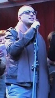 Mikołaj Lizut, dziennikarz.